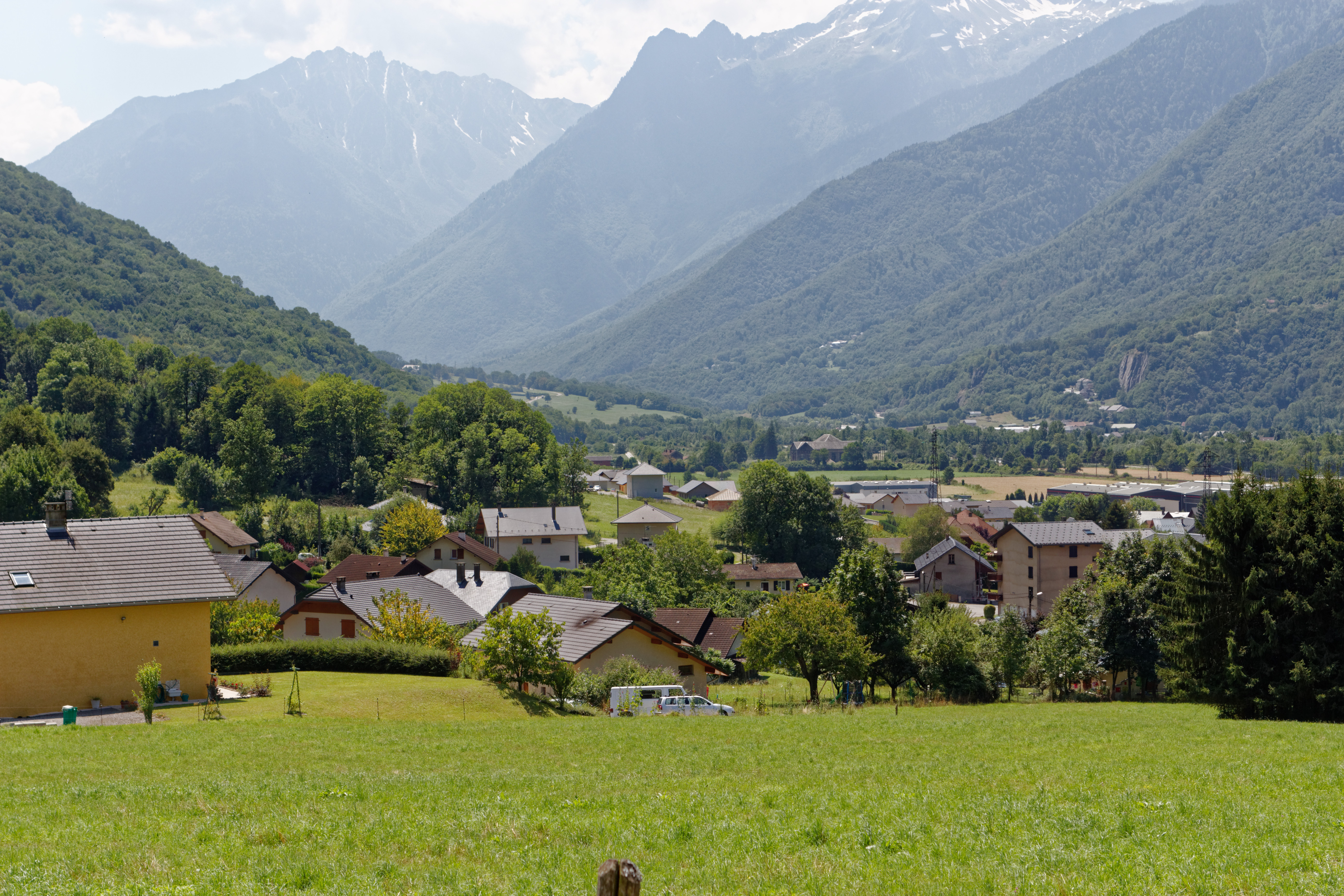 Vue d'Épierre / Épierre / Savoie / France